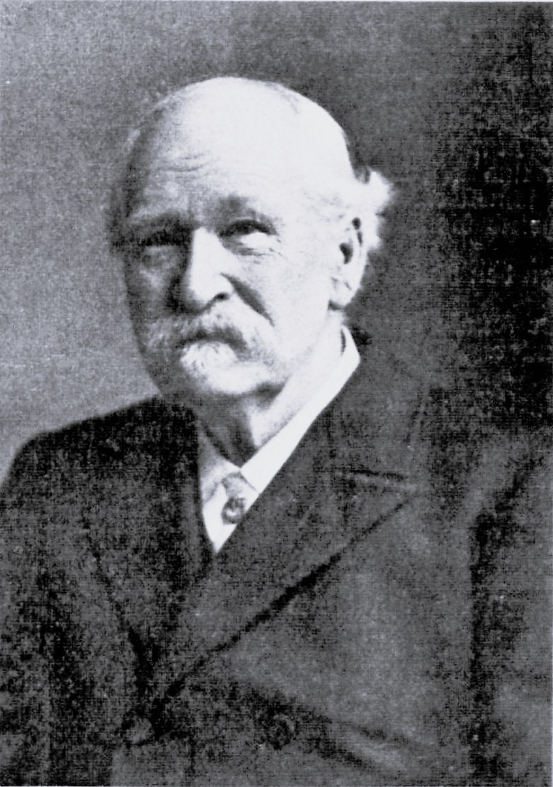 Johannes Nöhring. Anmerkungen: Todesjahr 1913